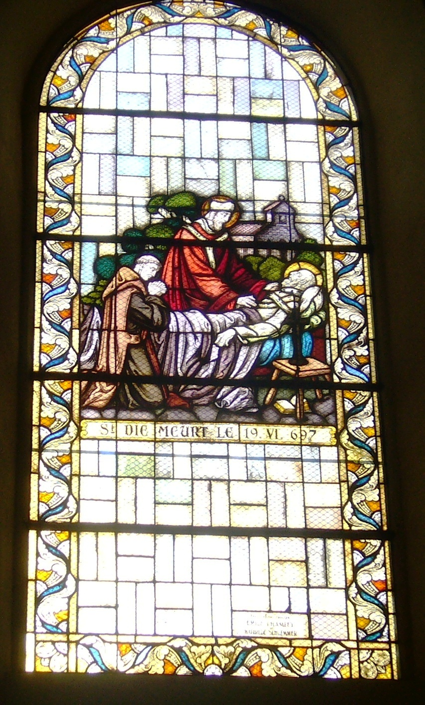 Vitrail se trouvant dans l'église de Breitenau représentant le décès de Saint-Dié survenu le 19 VI 697